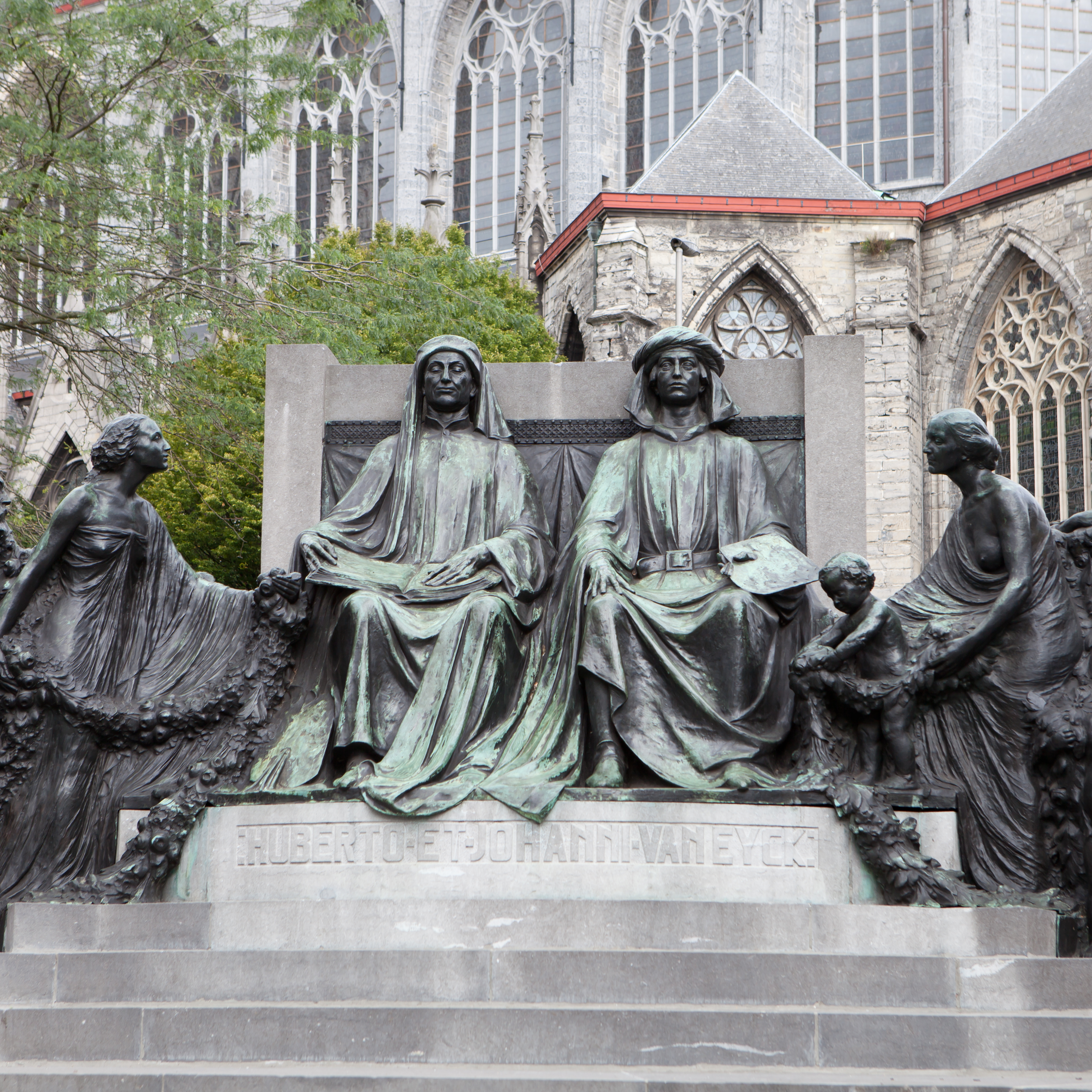 Van Eyck